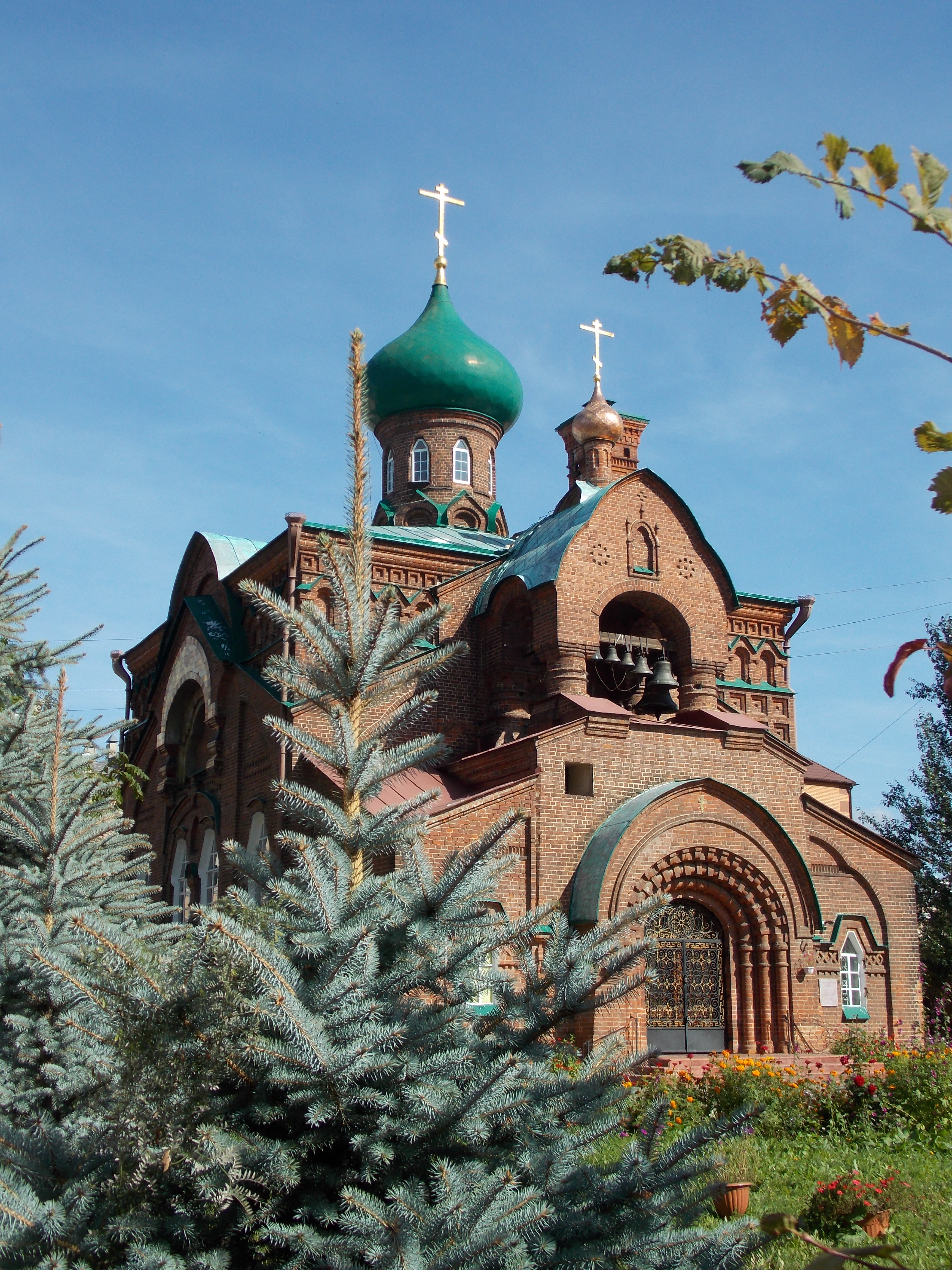 Церковь Казанской Богородицы (Старообрядческая): улица Новопесочная, 16, Казань, Татарстан